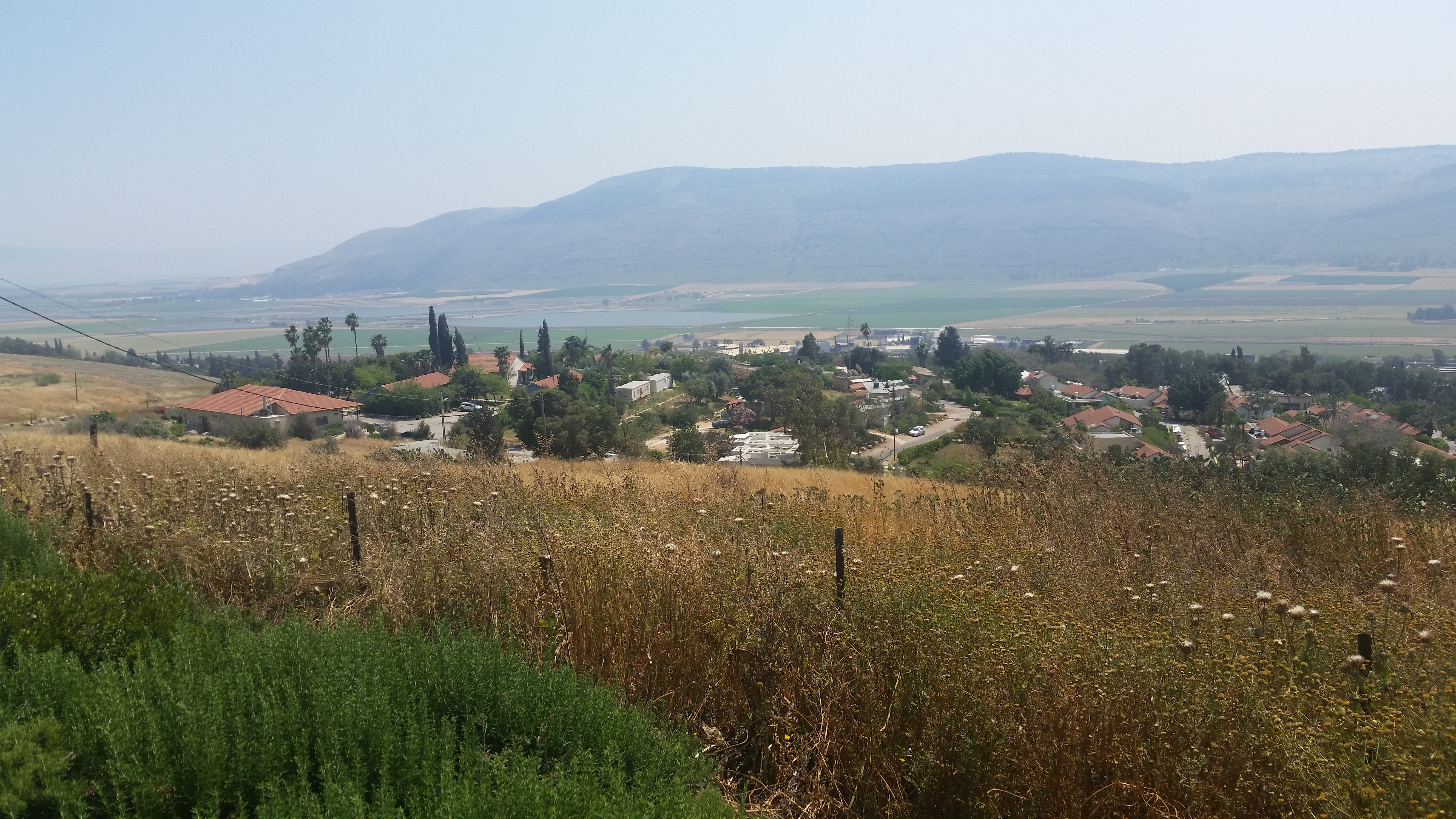 מבט ככלי על קיבוץ עין חרוד איחוד מגבעת קומי לכיוון דרום